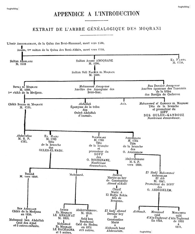 Généalogie de Mokrani, Royaume Ait Abbas, Kabylie du XVI ème au XIX ème siècle.